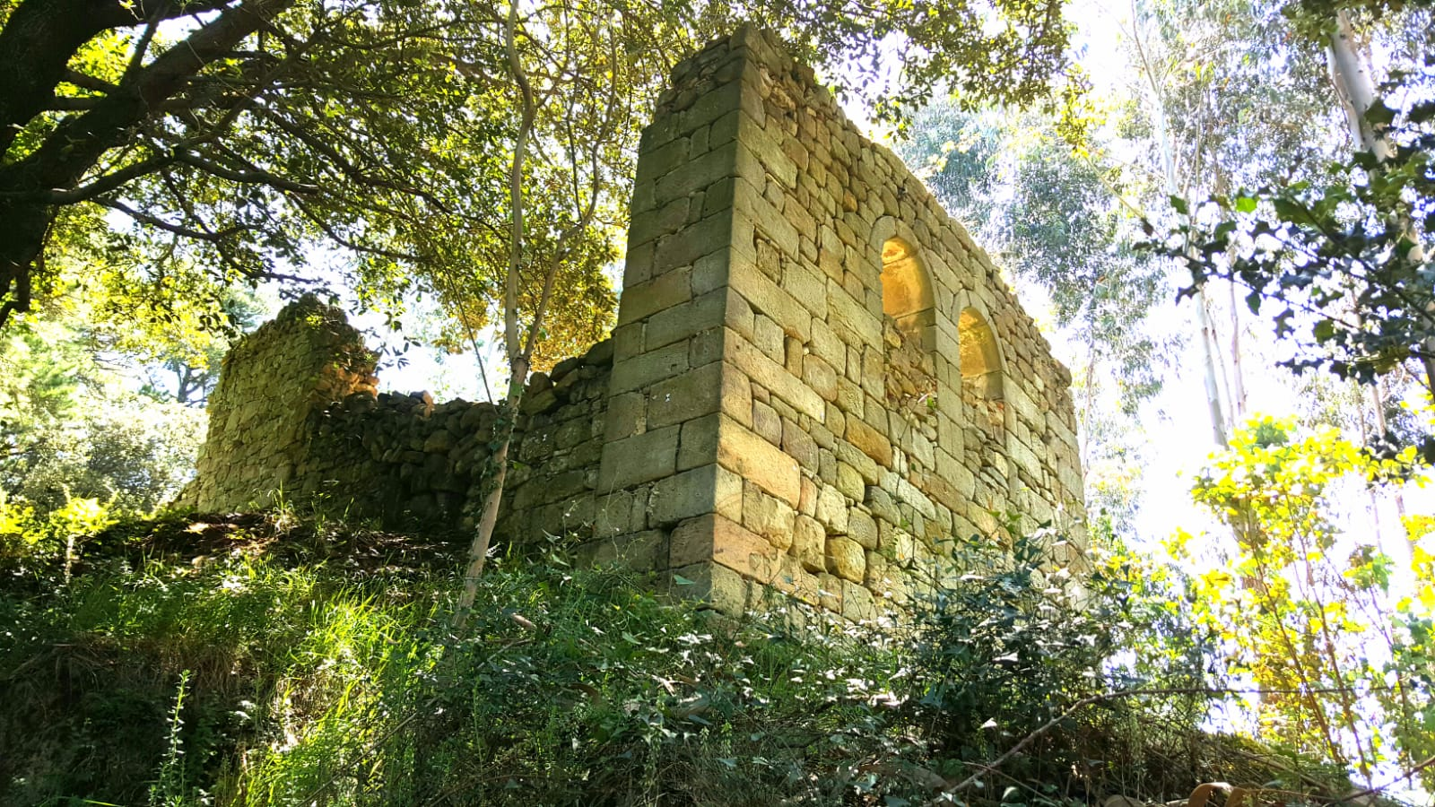 Atxispeko San Pedroko ermita